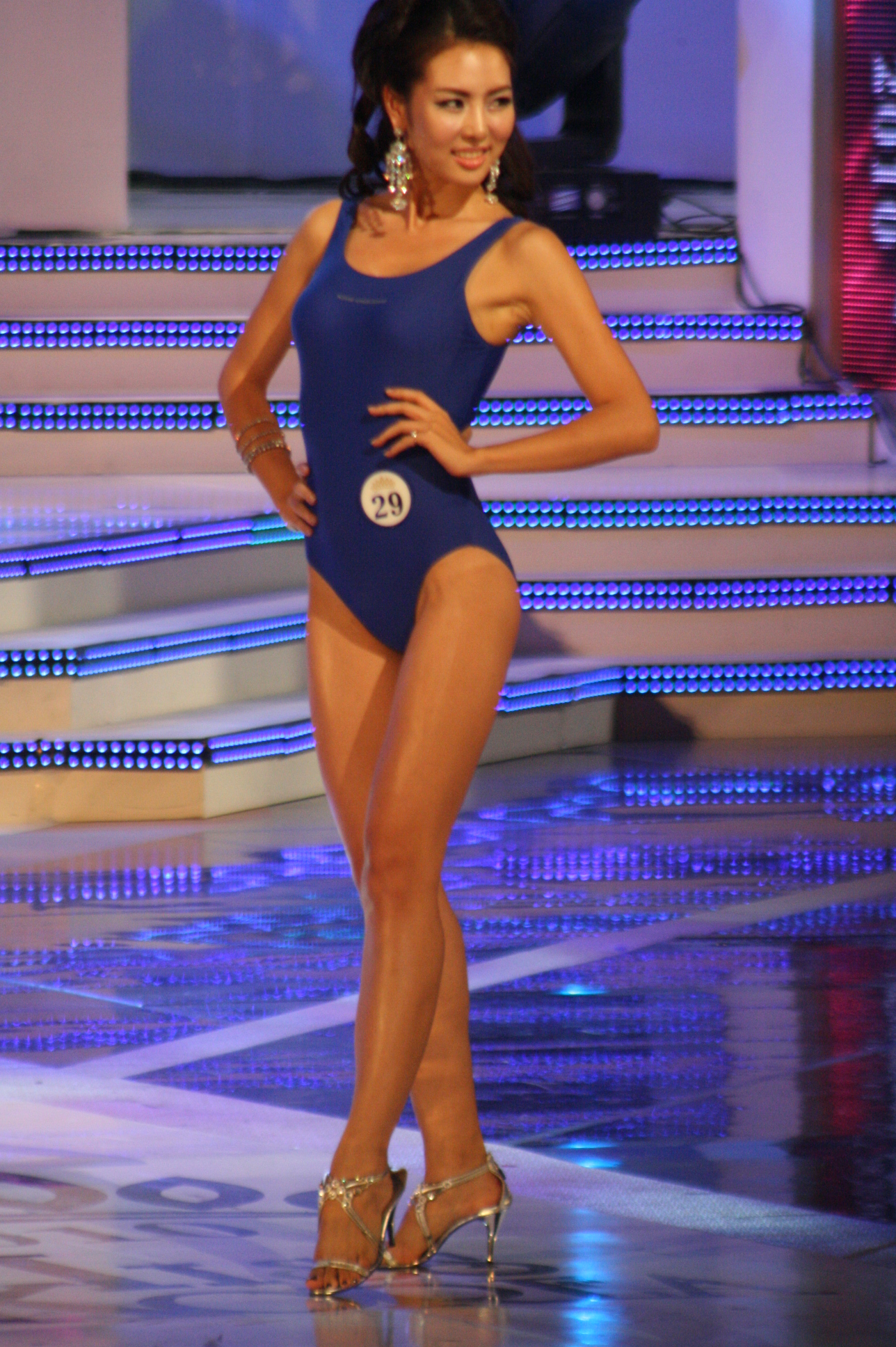 2010 미스코리아 선&포토제닉상 장윤진(서울 선) 수영복 심사